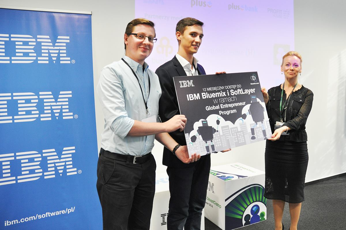 Błażej Wojtyła (pierwszy z lewej), CEO Jazzy Innovations, odbiera nagrodę główną Wirtualnego Hackathonu IBM.